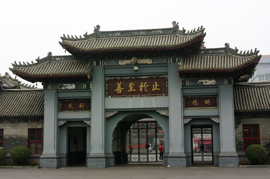 河南大学校门校训